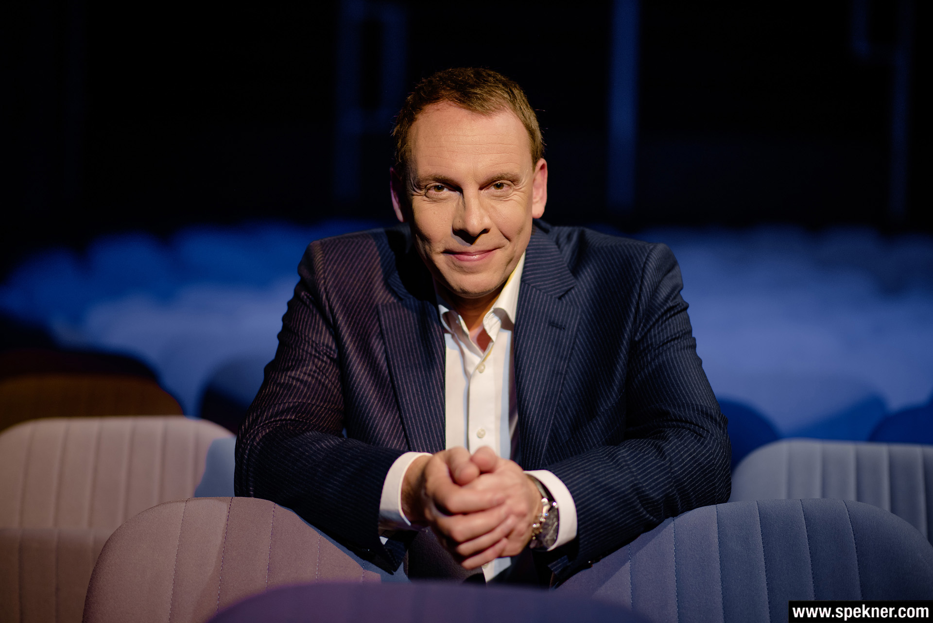 Georg Wawschinek in auditorium